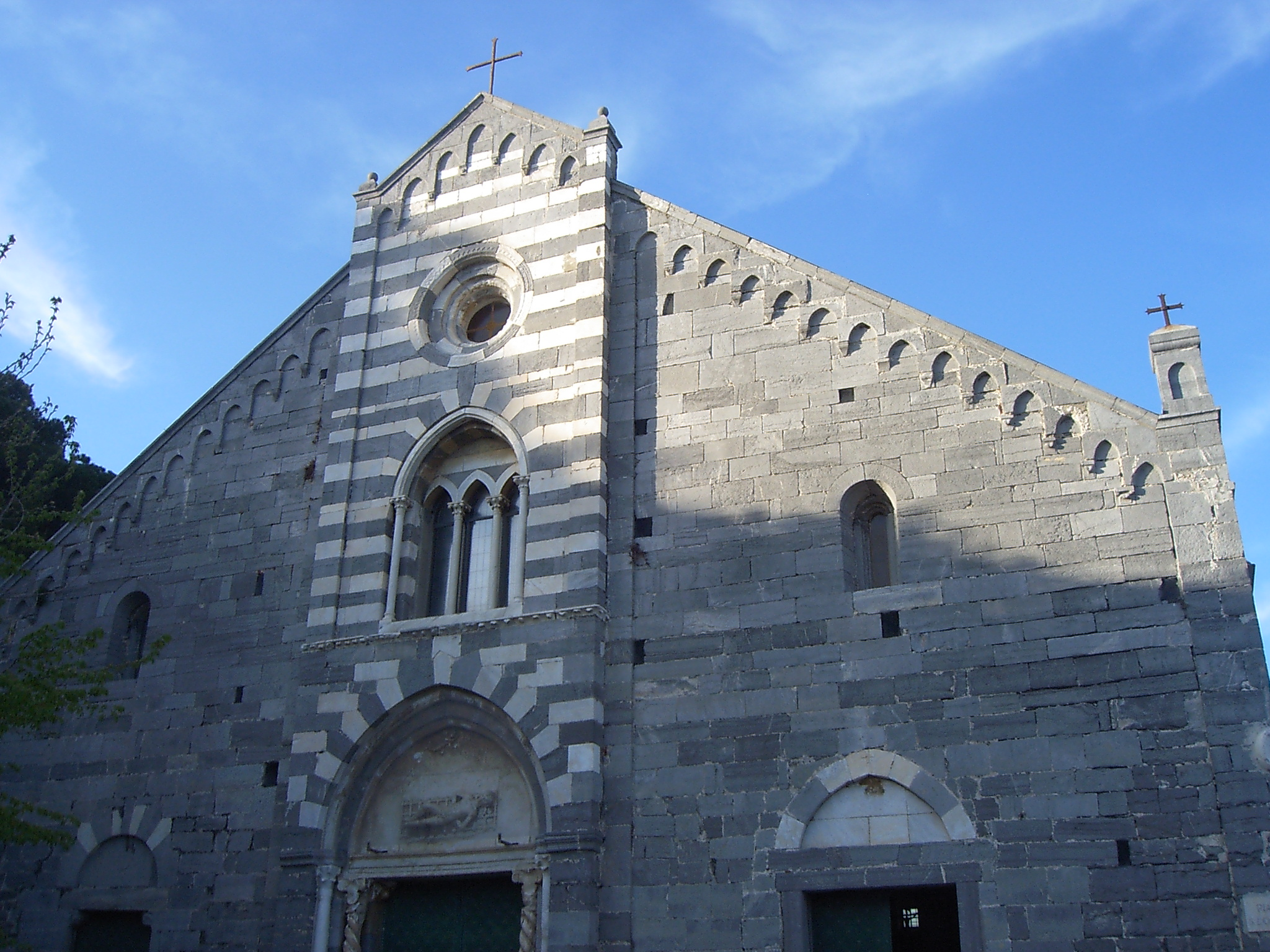 Portovenere, chiesa di San Lorenzo